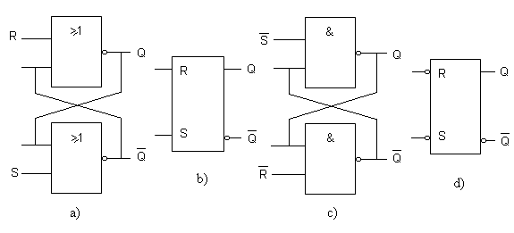 Reducción de tamaño, realizada por PACO, de la imagen:Biestable RS asincrono.PNG subida por usuario Digigalos para ajustarla al ancho de página. Categoría:Electrónica (imagen)